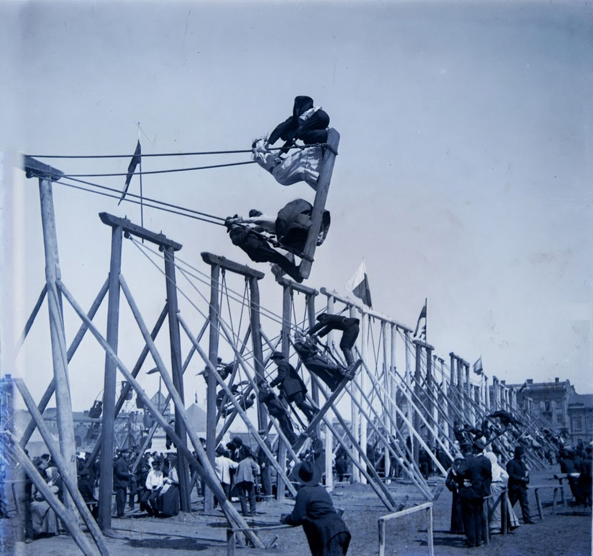 Ярмарок на одеському Куликовому полі